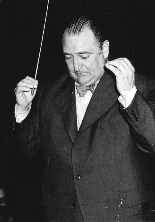 Zentralbild-Naumann 5.10.1956 Zur Auszeichnung mit dem Nationalpreis 1956 vorgesehen Prof. Franz Konwitschny Nationalpreisträger, Chefdirigent der Deutschen Staatsoper Berlin, für seine hervorragenden musikalischen Leistungen an der wiedereröffneten Deutschen Staatsoper Berlin, die entscheidend zu den Erfolgen dieses Hauses beigetragen haben. (II. Klasse, Kunst und Literatur) Foto gesperrt bis zur offiziellen Auszeichnung